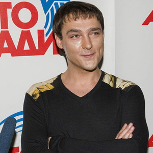 Юрий Шатунов на восьмом фестивале «Дискотека 80-х» в ноябре 2009 года